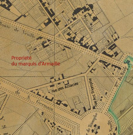 Rue d'Armaillé entre Etoile et Ave des Ternes extrait commenté de : Plan géométral de Paris et de ses agrandissements à l'échelle d'un millimètre pour 10 m. 1 : 10 000 / Gravé le trait par Piat ; la lettre par P. Rousset ; Revu et mis au courant par Alfred Potiquet E. Andriveau-Goujon (Paris)-1866 Informations détaillées Cartes et plans Bibliothèque nationale de France, département Cartes et plans, GE D-14437 --plan complet sur gallica .bnf.